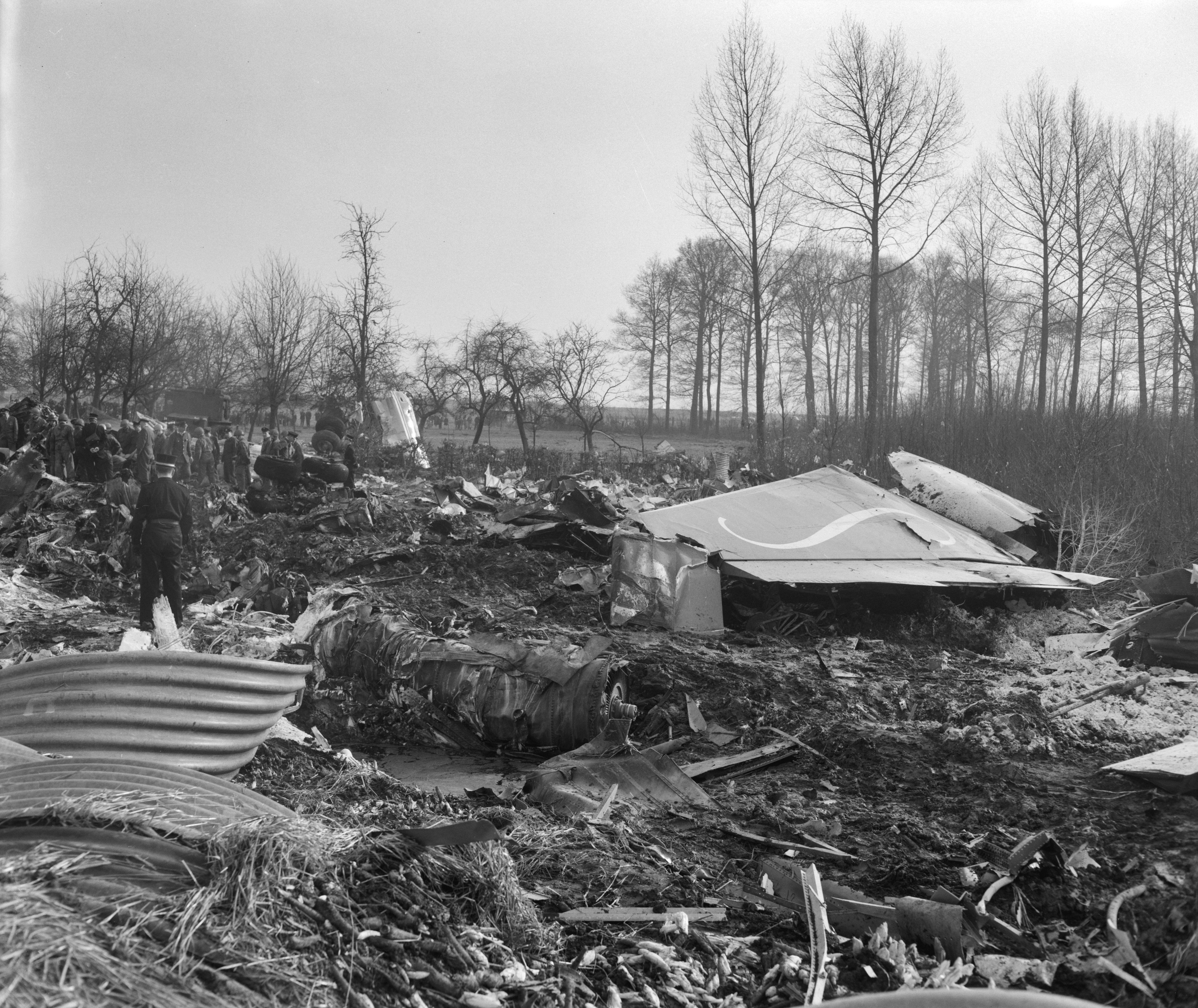 Collectie / Archief : Fotocollectie Anefo Reportage / Serie : [ onbekend ] Beschrijving : Ramp met Sabenavliegtuig bij Brussel Datum : 15 februari 1961 Locatie : Brussel Trefwoorden : Rampen Instellingsnaam : Sabena Fotograaf : Behrens, Herbert / Anefo Auteursrechthebbende : Nationaal Archief Materiaalsoort : Negatief (zwart/wit) Nummer archiefinventaris : bekijk toegang 2.24.01.04 Bestanddeelnummer : 912-1021